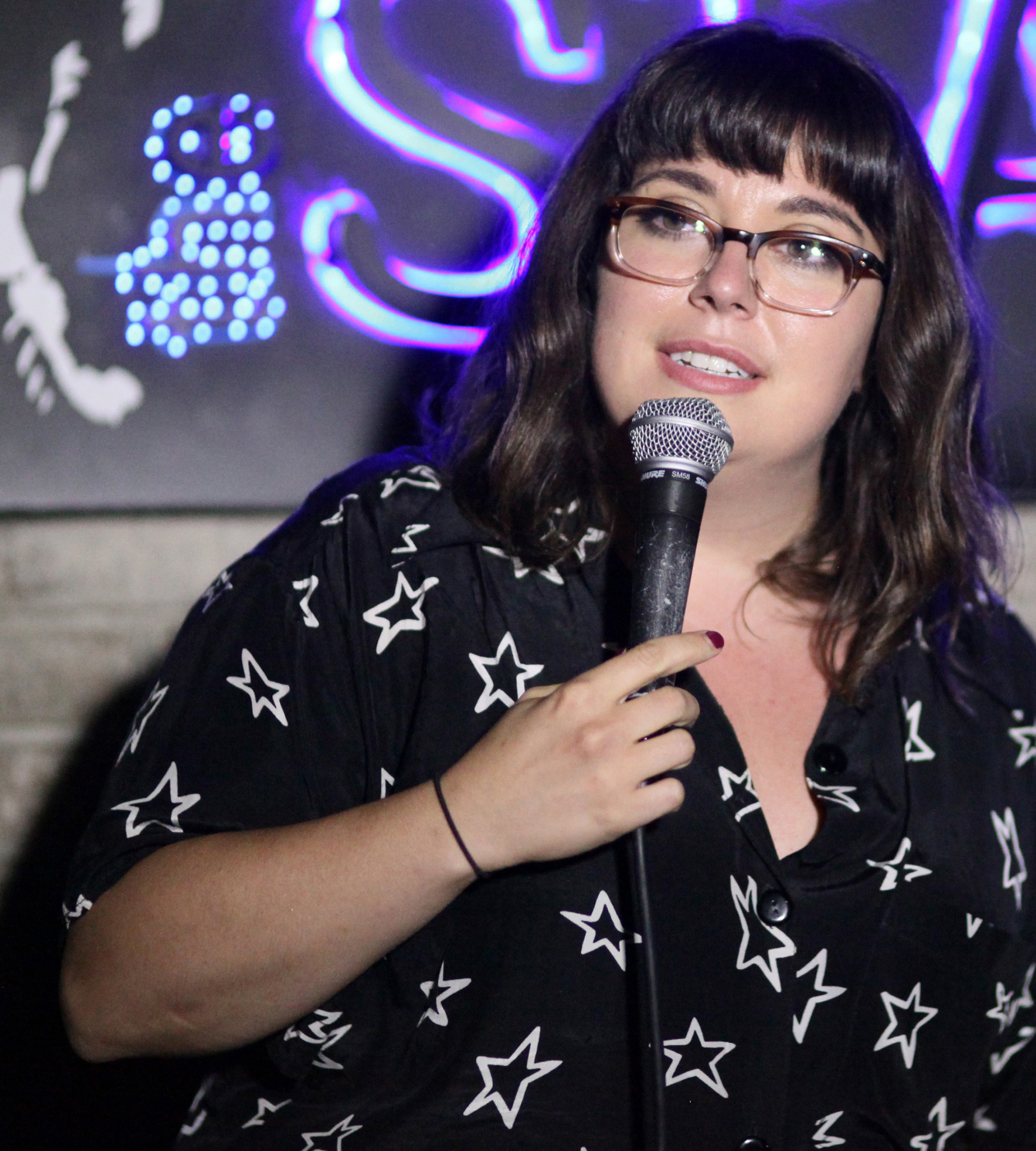 Zigrino in March 2017